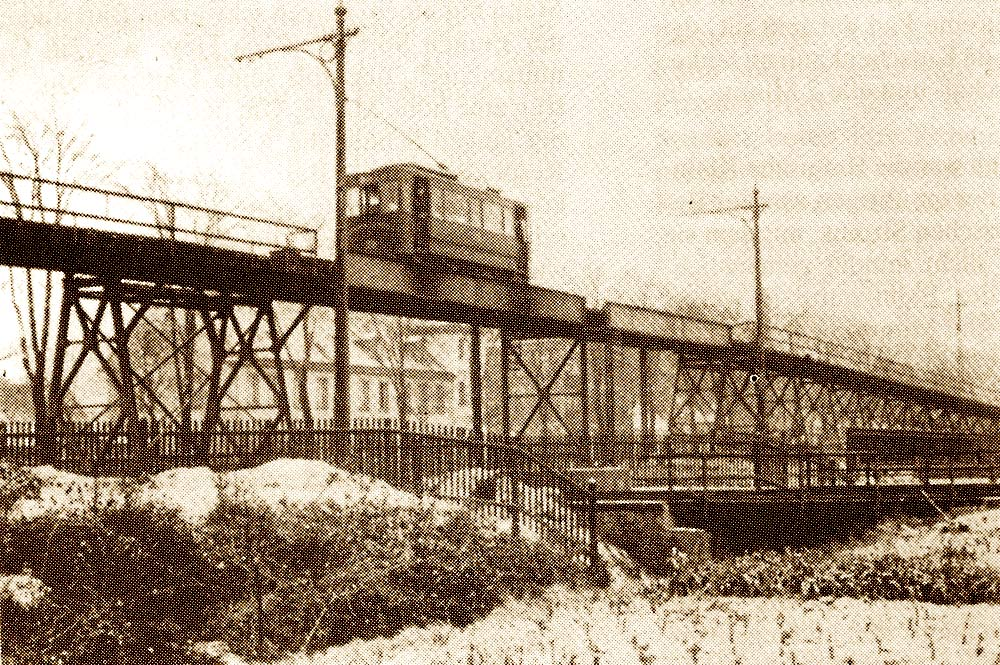 "Triebwagen auf der Brücke über die Eisenbahn in Benrath an der Hildener Straße" [1]. Kleinbahn (Schmalspur) der einspurigen Straßenbahnlinie Benrath - Hilden - Vohwinkel - Ohligs (1898 von Benrath bis Hilden als Teilstrecke des sogenannten Benrather Netzes der Actiengesellschaft Bergische Kleinbahnen eröffnet, 1911 von der Stadt Düsseldorf übernommen und an die Rheinische Bahngesellschaft AG - heute Rheinbahn AG - verpachtet). Frühere Straßenbahnbrücke an der Kreuzung mit der Eisenbahnlinie in der Nähe des heutigen Bahnhofes, Hildener Straße, Düsseldorf-Benrath, Deutschland.